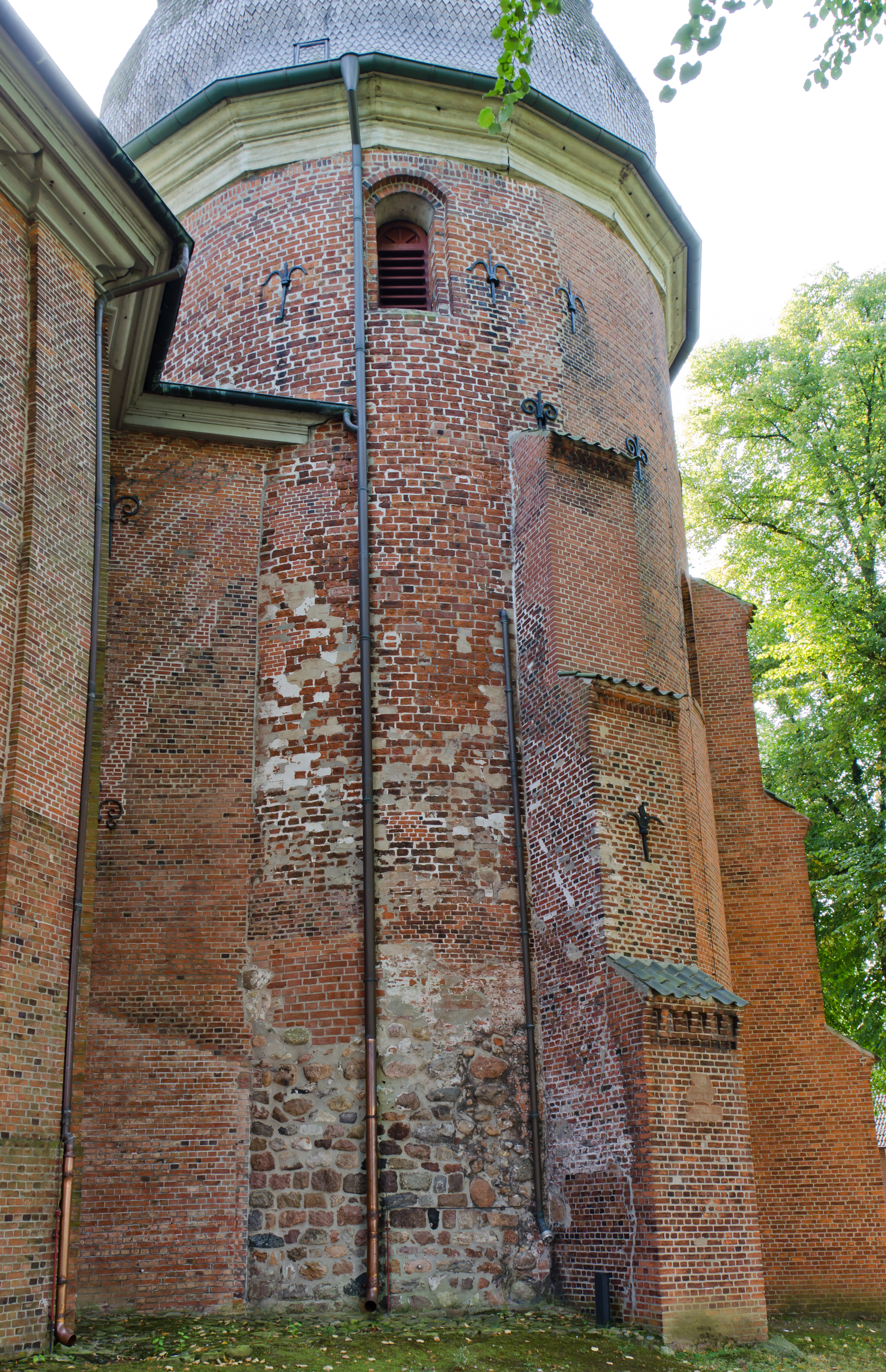 Rellinger Kirche - Turm mit romanischen Mauerteilen